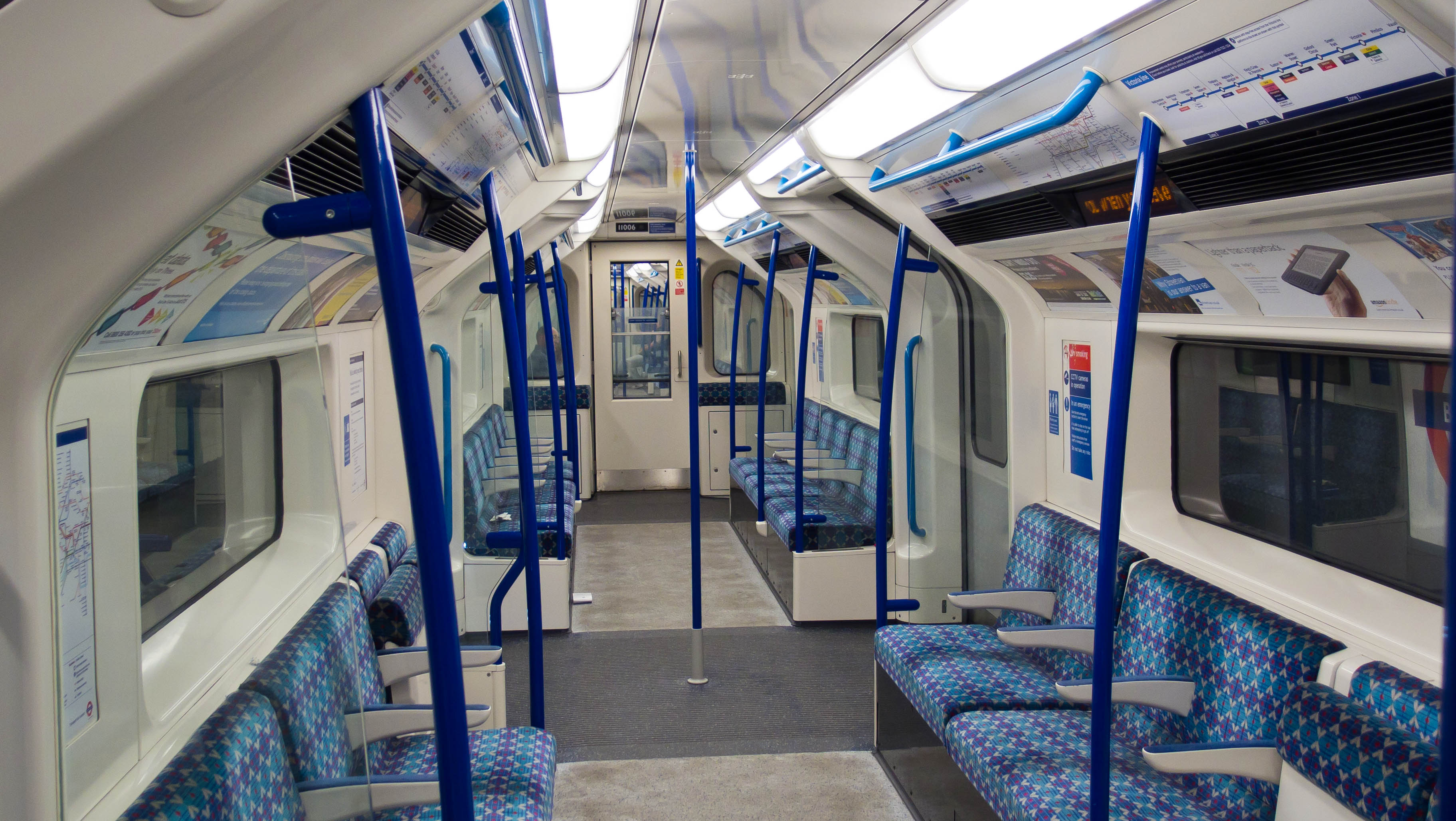 Victoria Line 2009 stock